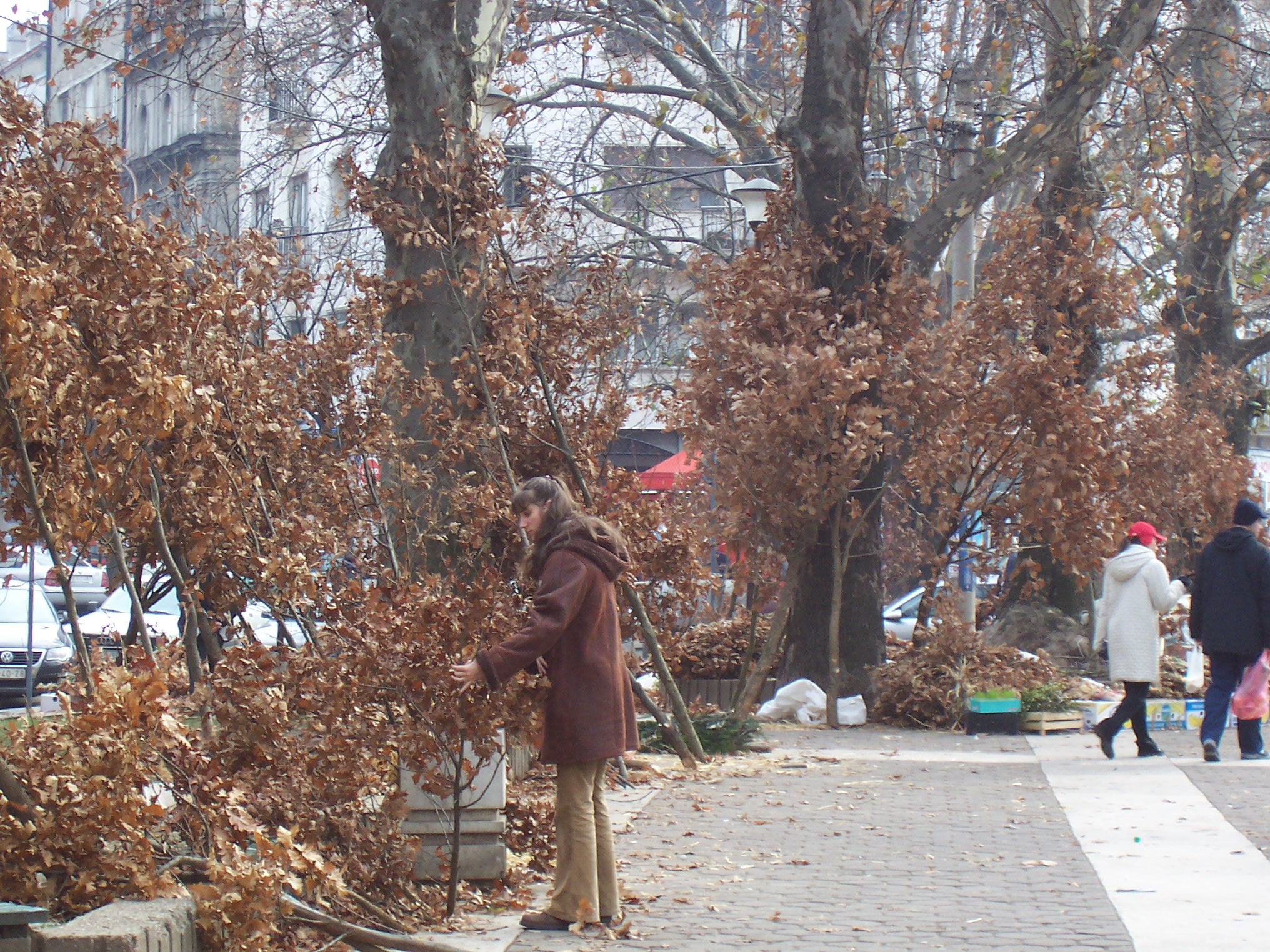 Badnjak saleswoman at Kalenić Marketplace, Belgrade, Serbia